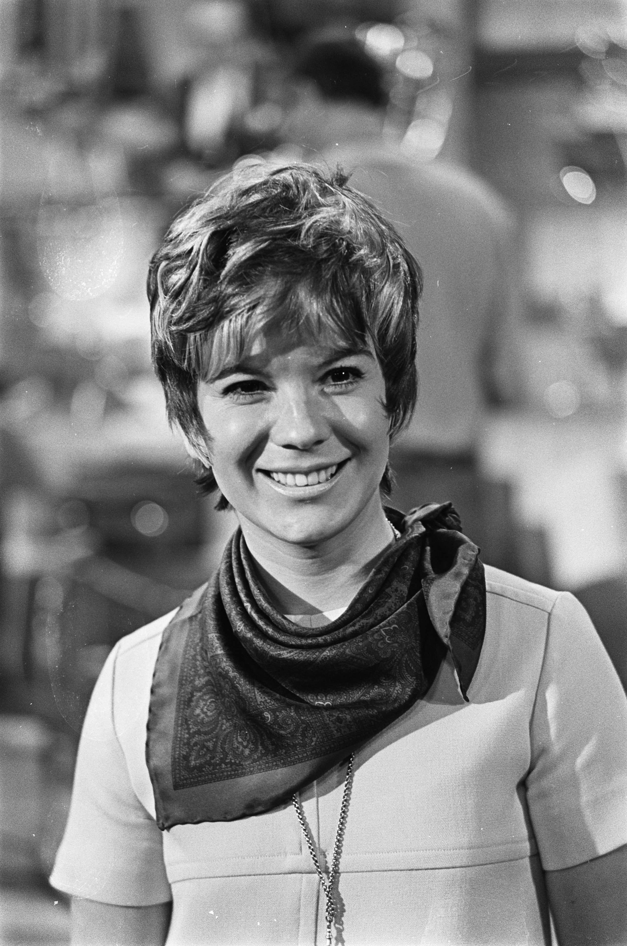 Collectie / Archief : Fotocollectie Anefo Reportage / Serie : Grand Gala du Disque 1968 Beschrijving : Grand Gala du Disque in de RAI. Vikki Carr tijdens repetitie Datum : 7 maart 1968 Locatie : Amsterdam Trefwoorden : repetities Persoonsnaam : Carr, Vikki Fotograaf : Nijs, Jac. de / Anefo Auteursrechthebbende : Nationaal Archief Materiaalsoort : Negatief (zwart/wit) Nummer archiefinventaris : bekijk toegang 2.24.01.05 Bestanddeelnummer : 921-1452 Reacties Geplaatst door Maaike op 07 maart 2014 - 19:16. Locatie: RAI-congrescentrum Plaats: Amsterdam, Noord-Holland